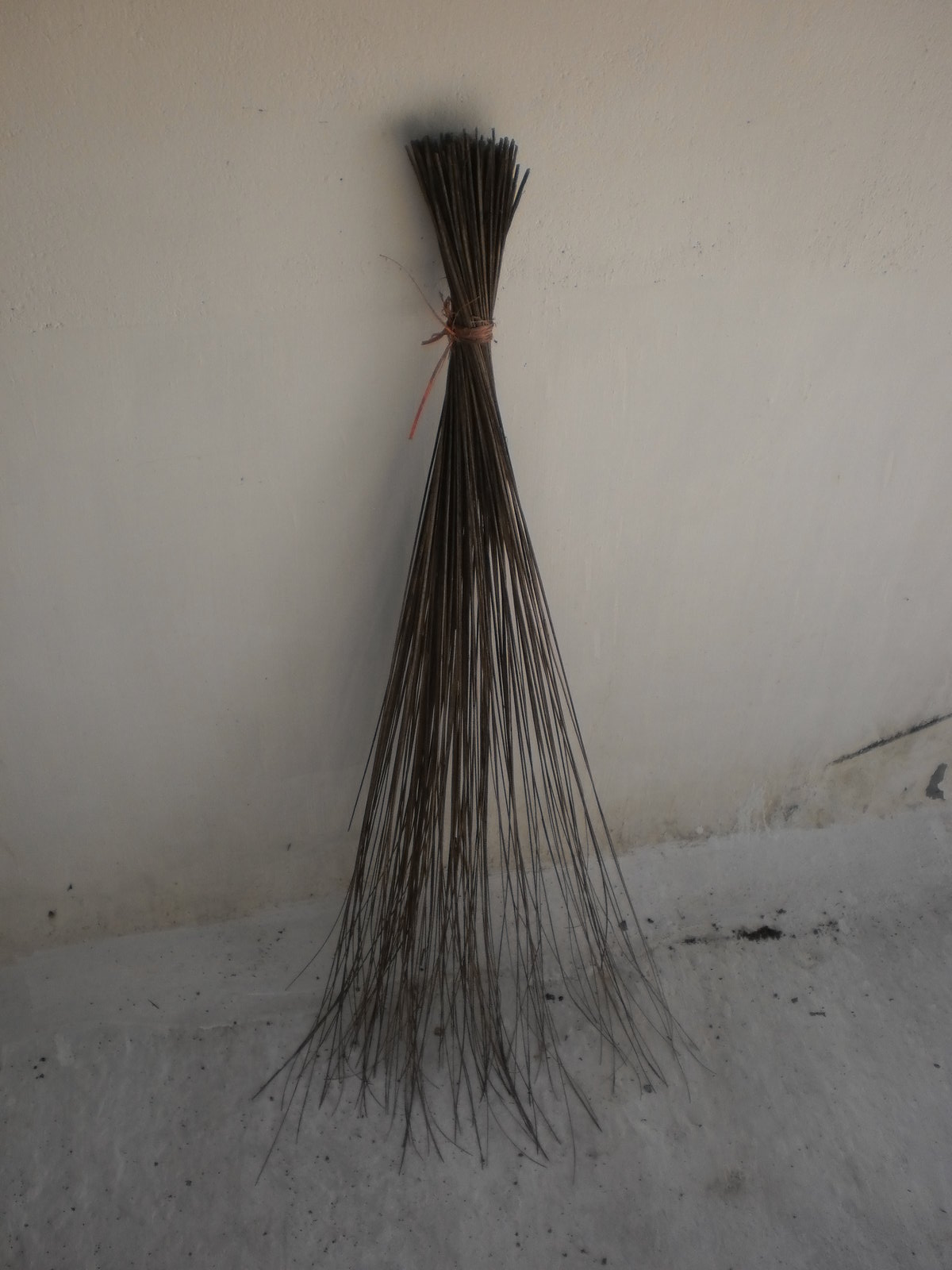 ഈര്‍ക്കില കൊണ്ട് നിര്‍മ്മിച്ച ഒരു ചൂല്‍